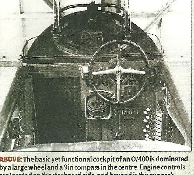 Handley Page cocpit